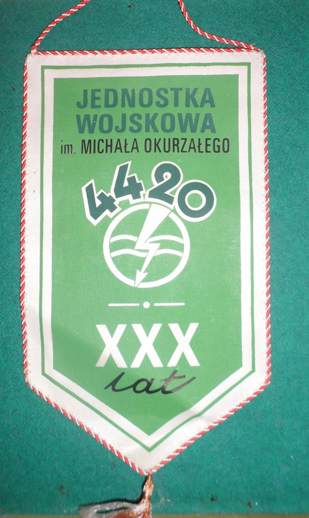 Garnizon Przasnysz, proporczyk JW 4420